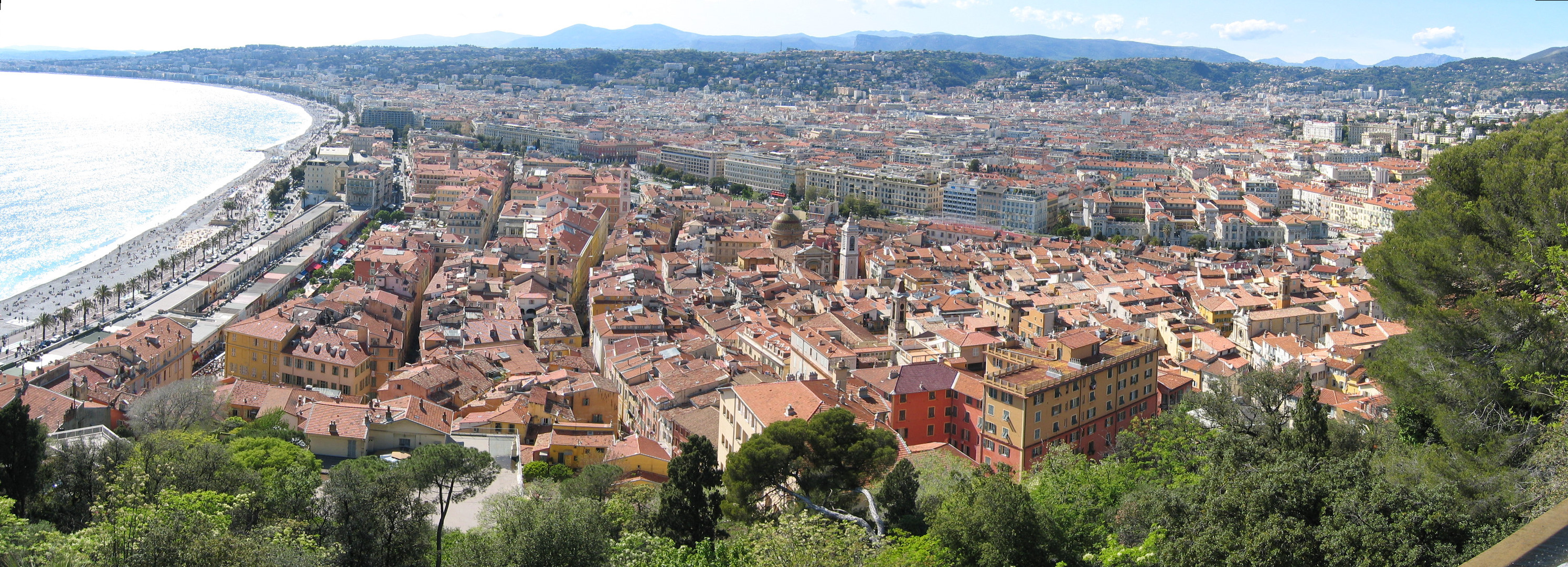 Vue panoramique du Vieux-Nice prise de la colline du château en 2008